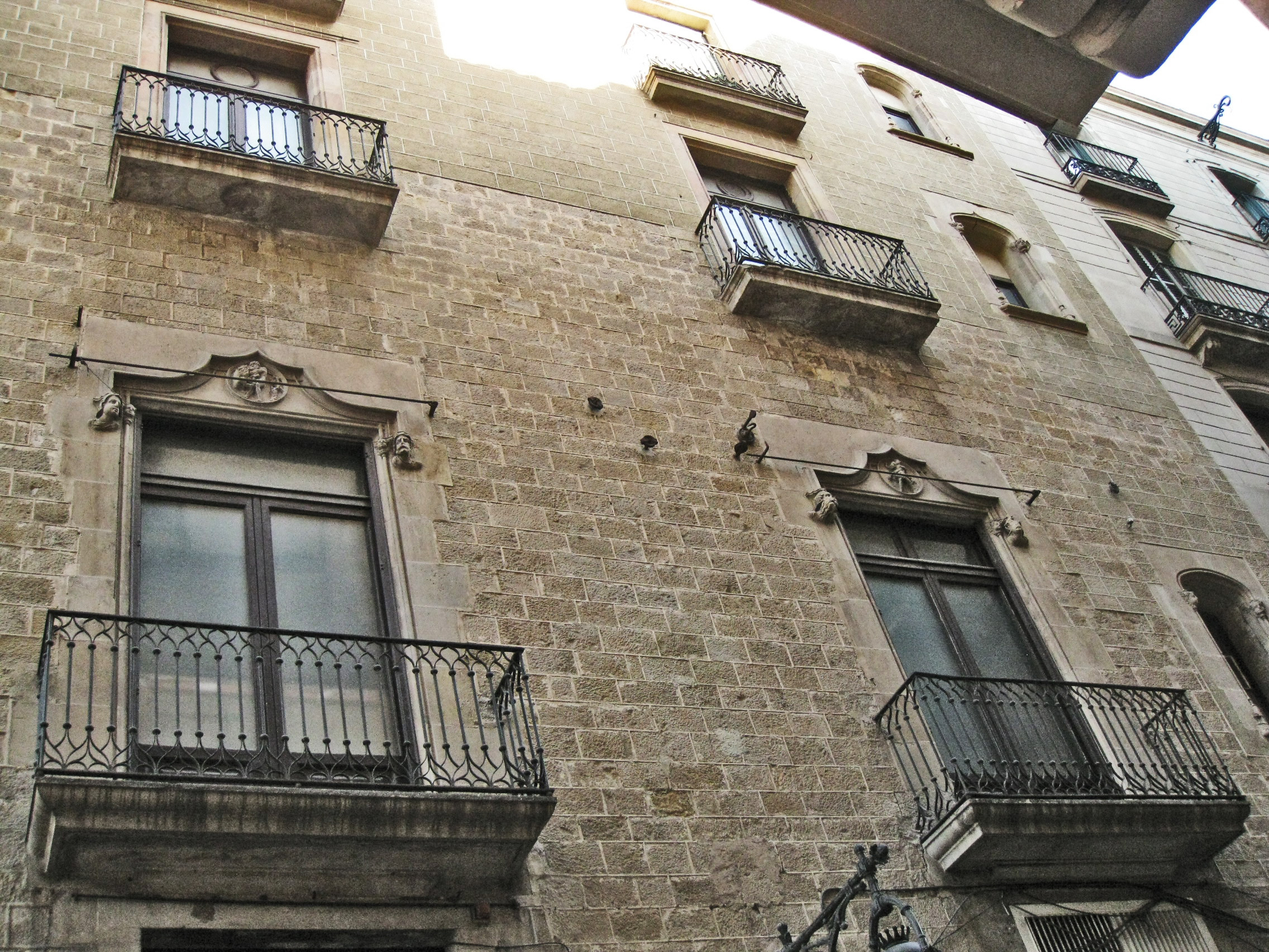 Casa Bassols (segle XVI), seu del Reial Cercle Artístic. Detall de la façana que dóna al carrer de la Cucurulla.